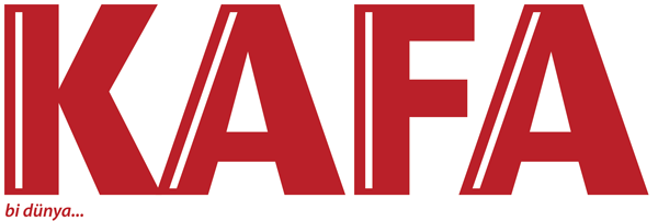 KAFA Dergisi kırmızı logo